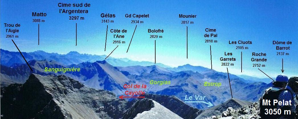 Panorama légendé des sommets - jusqu'au massif franco-italien du Mercantour-Argentera - à l'est et au sud-est du Mont-Pelat (3050 m) situé à la limite des départements 04 (Alpes de Haute-Provence) et 06 (Alpes-Maritimes) en FRANCE.